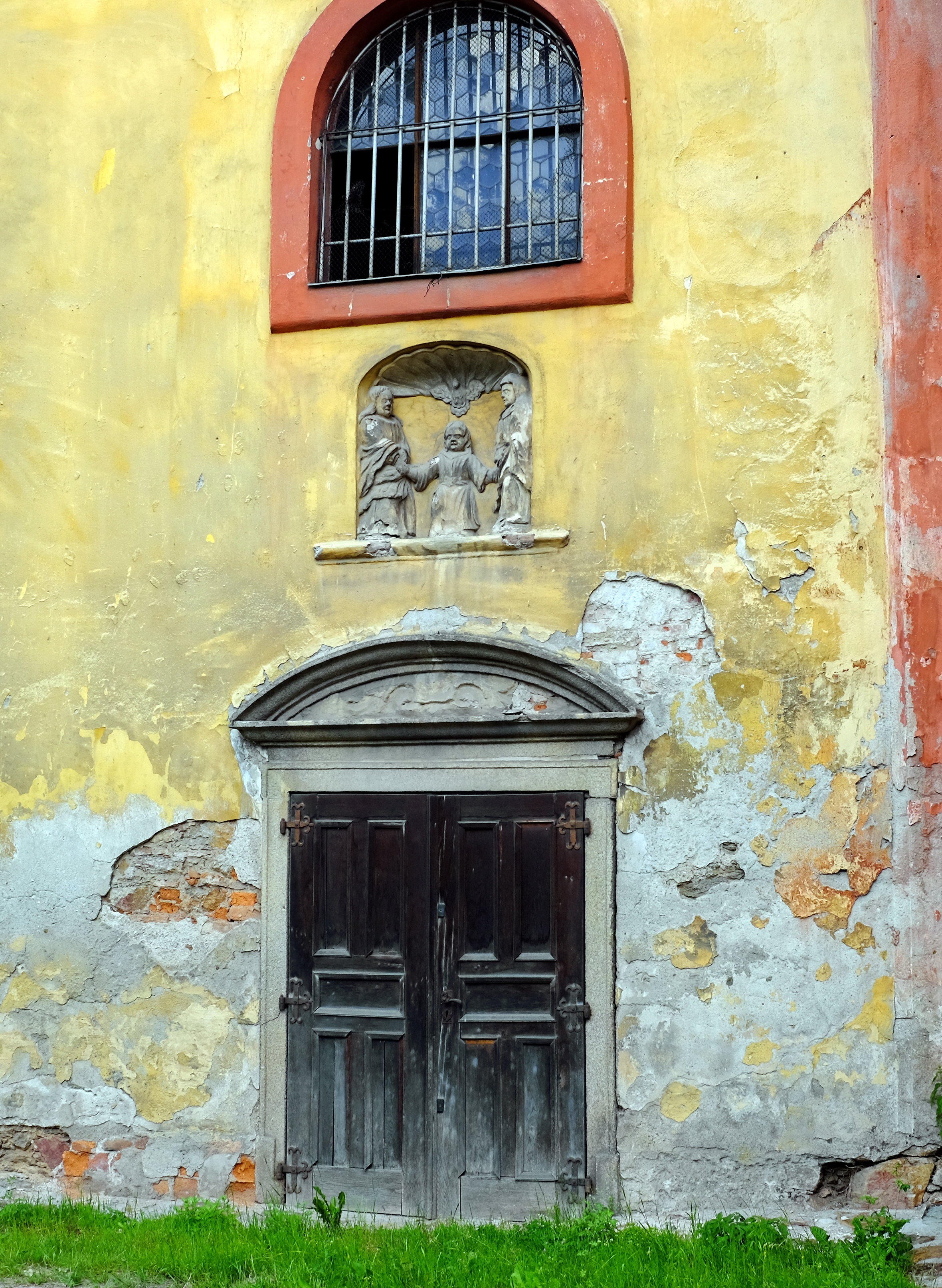 Kostel svaté Anny, Nové Město, Horní Slavkov, Horní Slavkov.